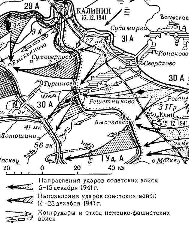 Вырезка из карты